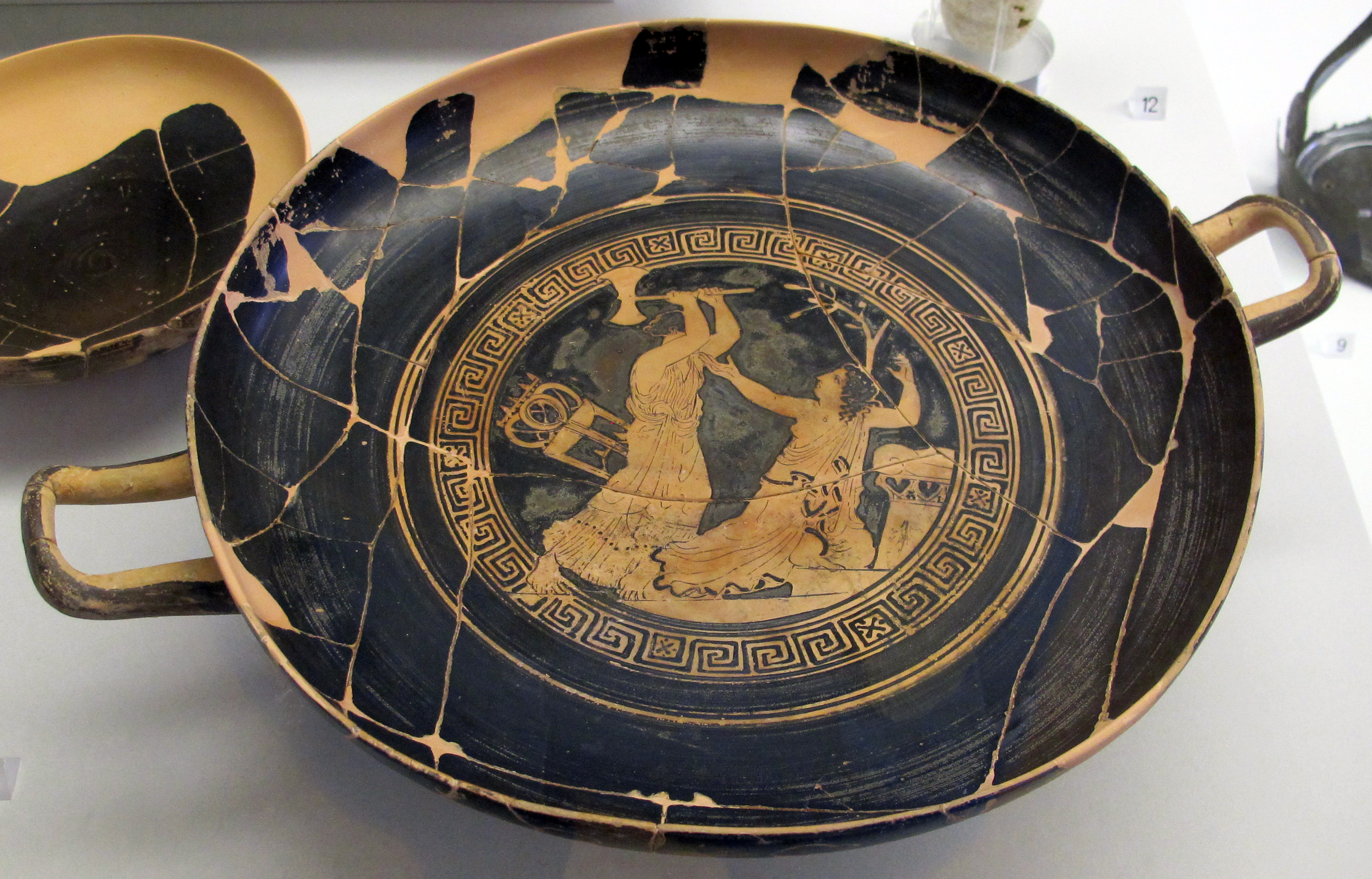 Museo Archeologico Nazionale - MIBAC This is a photo of a monument which is part of cultural heritage of Italy.